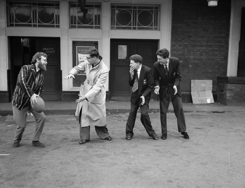 Teitl Cymraeg/Welsh title: Myfyrwyr newydd yn cyrraedd Coleg Prifysgol Gogledd Cymru Bangor Ffotograffydd/Photographer: Geoff Charles (1909-2002) Dyddiad/Date: 9/10/1958 Cyfrwng/Medium: Negydd ffilm / Film negative Cyfeiriad/Reference: (gch19534) Rhif cofnod / Record no.: 3470058 Rhagor o wybodaeth am gasgliad Geoff Charles yn Llyfrgell Genedlaethol Cymru More information about the Geoff Charles Collection at the National Library of Wales Mae ffotograffau Geoff Charles hefyd yn rhan o Broject Europeana Libraries Geoff Charles' photographs also form part of the Europeana Libraries Project